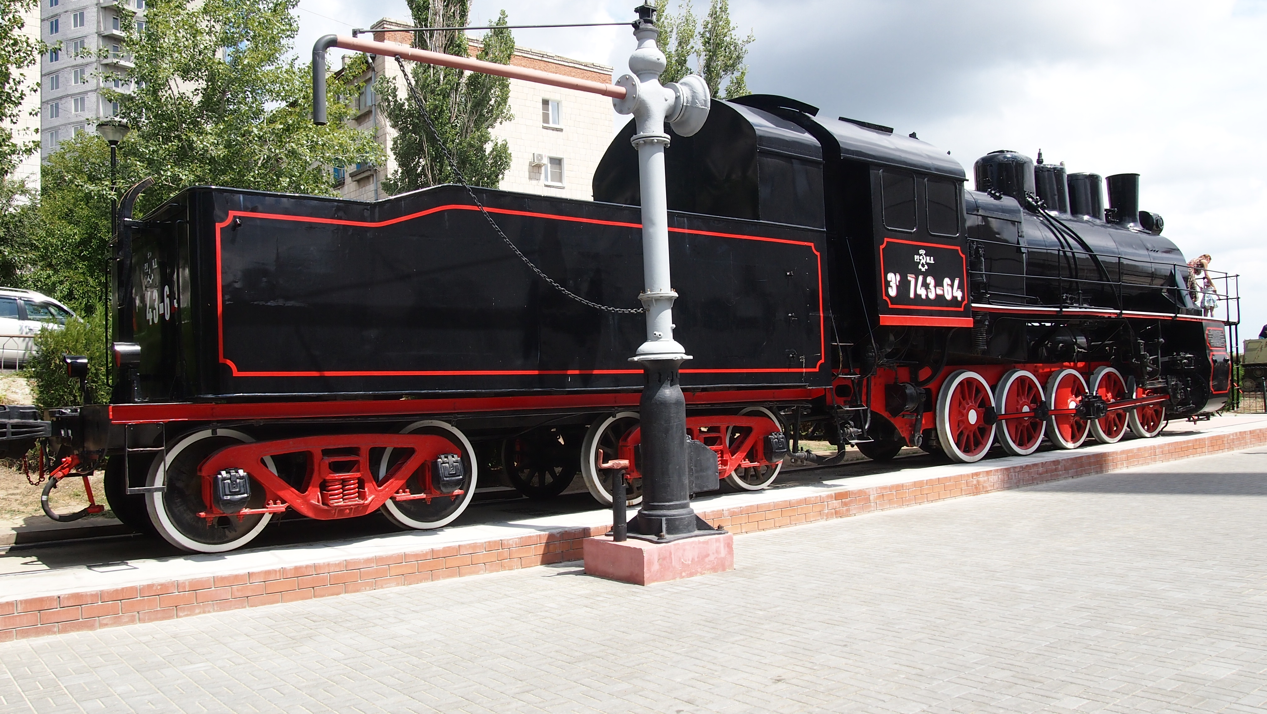 экспонат